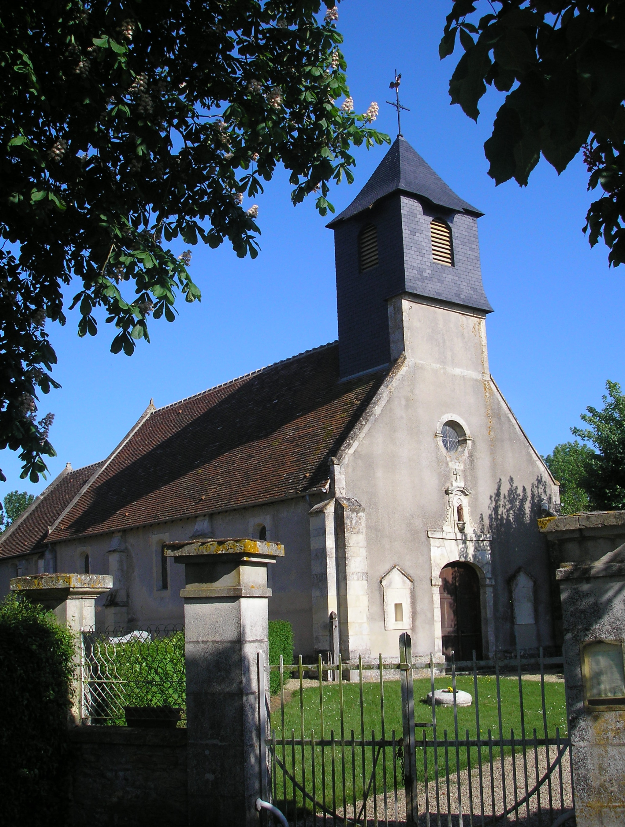 Saint-Ouen-du-Mesnil-Oger (Normandie, France). L'église Notre-Dame d'Héritot.